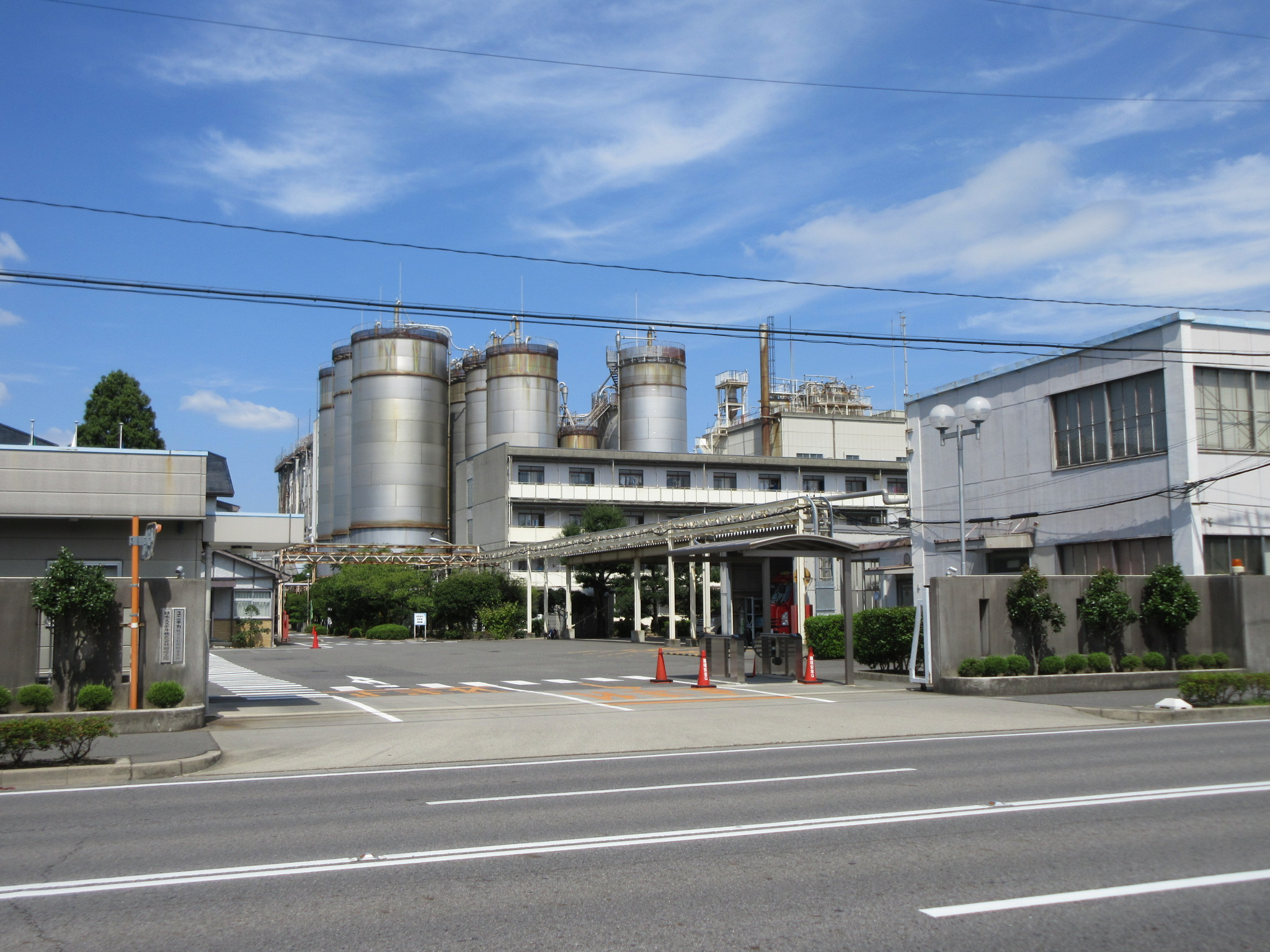 ユニチカ岡崎事業所（岡崎市日名北町）